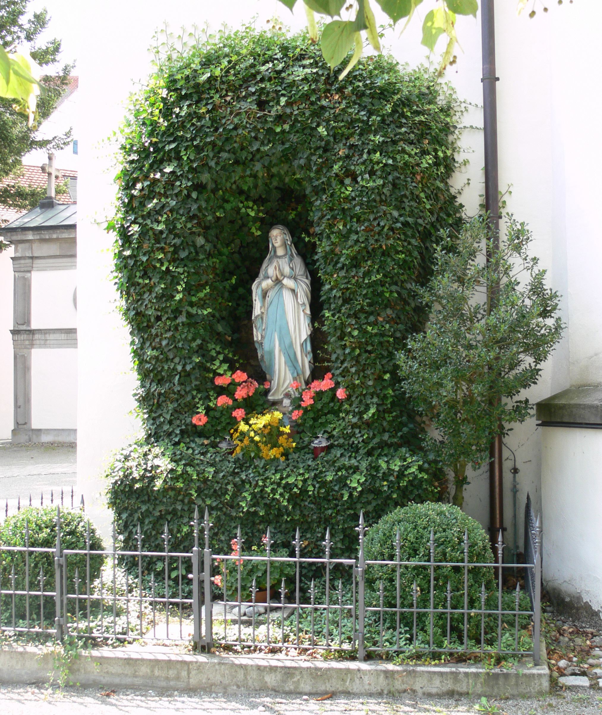 Aulendorf, Landkreis Ravensburg; Lourdes-Grotte bei der Pfarrkirche St. Martin